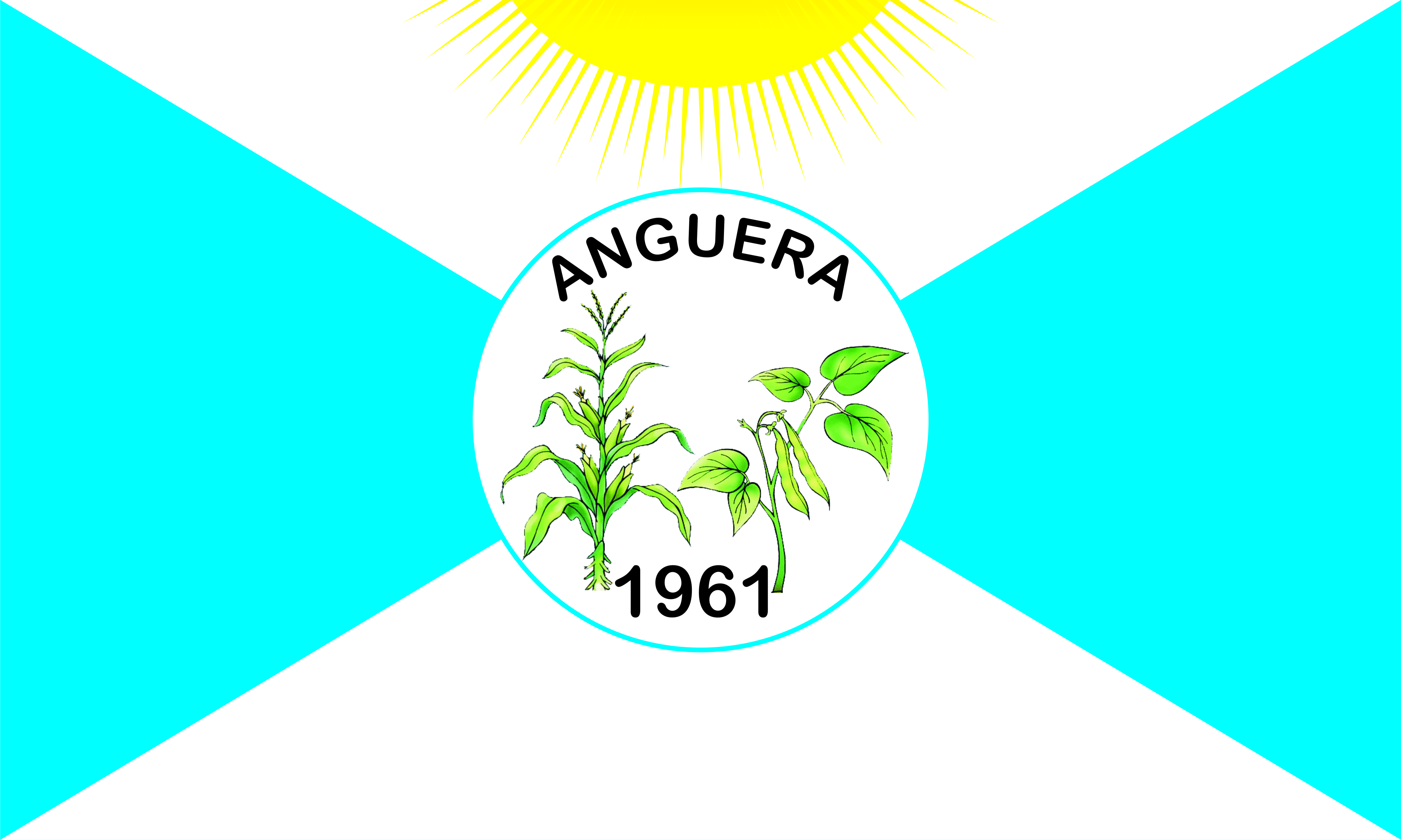 Bandeira de Anguera